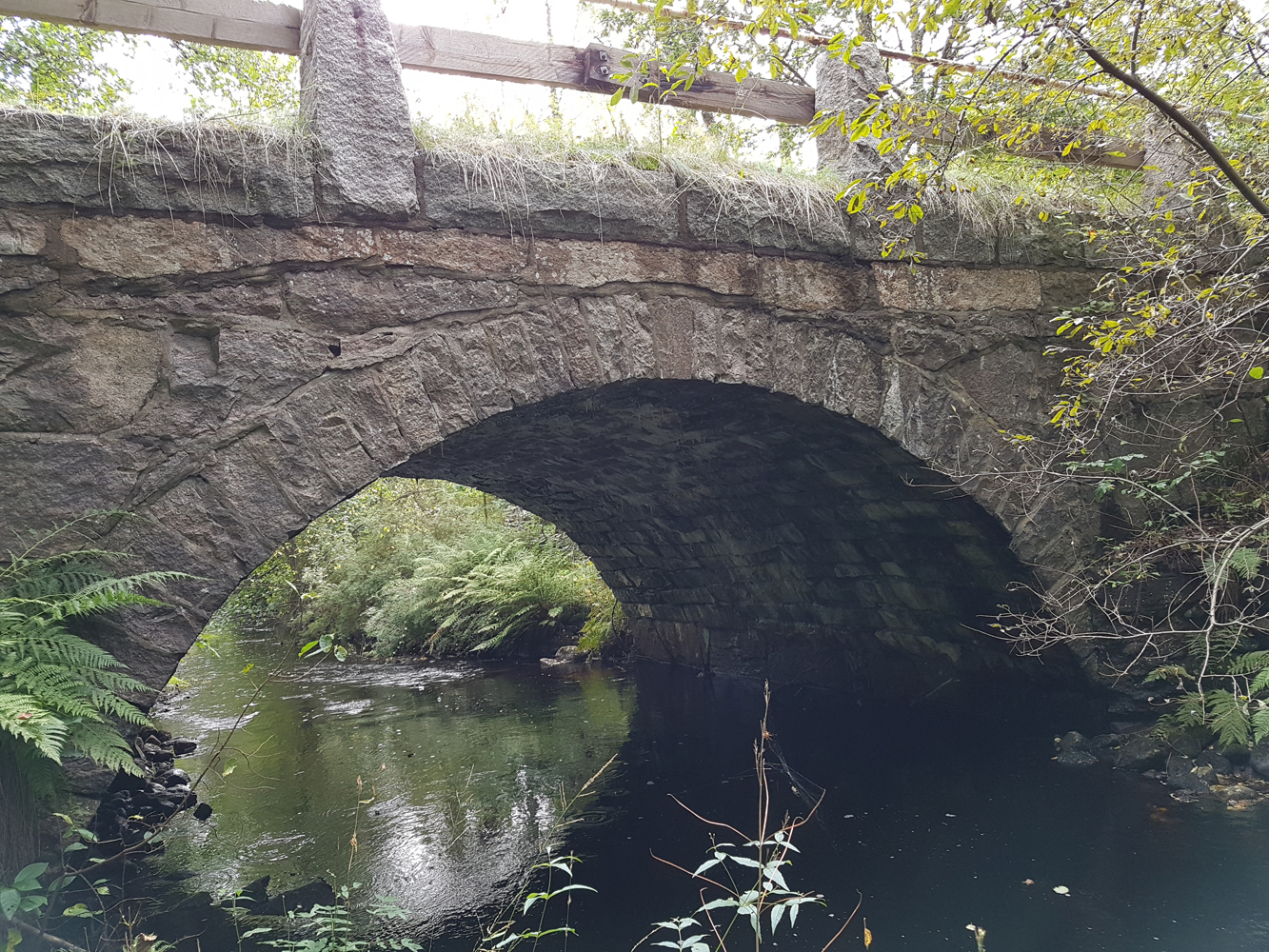 Stenvalvsbro i Skärkered söder om Simlångsdalen sedan 2015 tillhörande Breareds kulturhistoriska förening